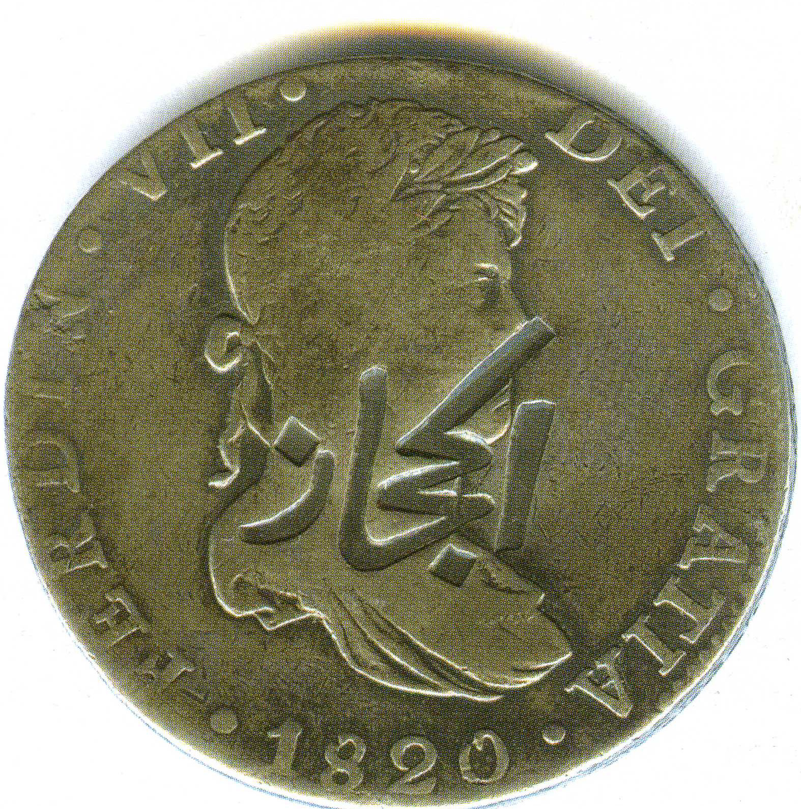 Moneda española utilizada en Hejaz. La inscripción original era "FERDIN. VII - DEI GRATIA - 1820".